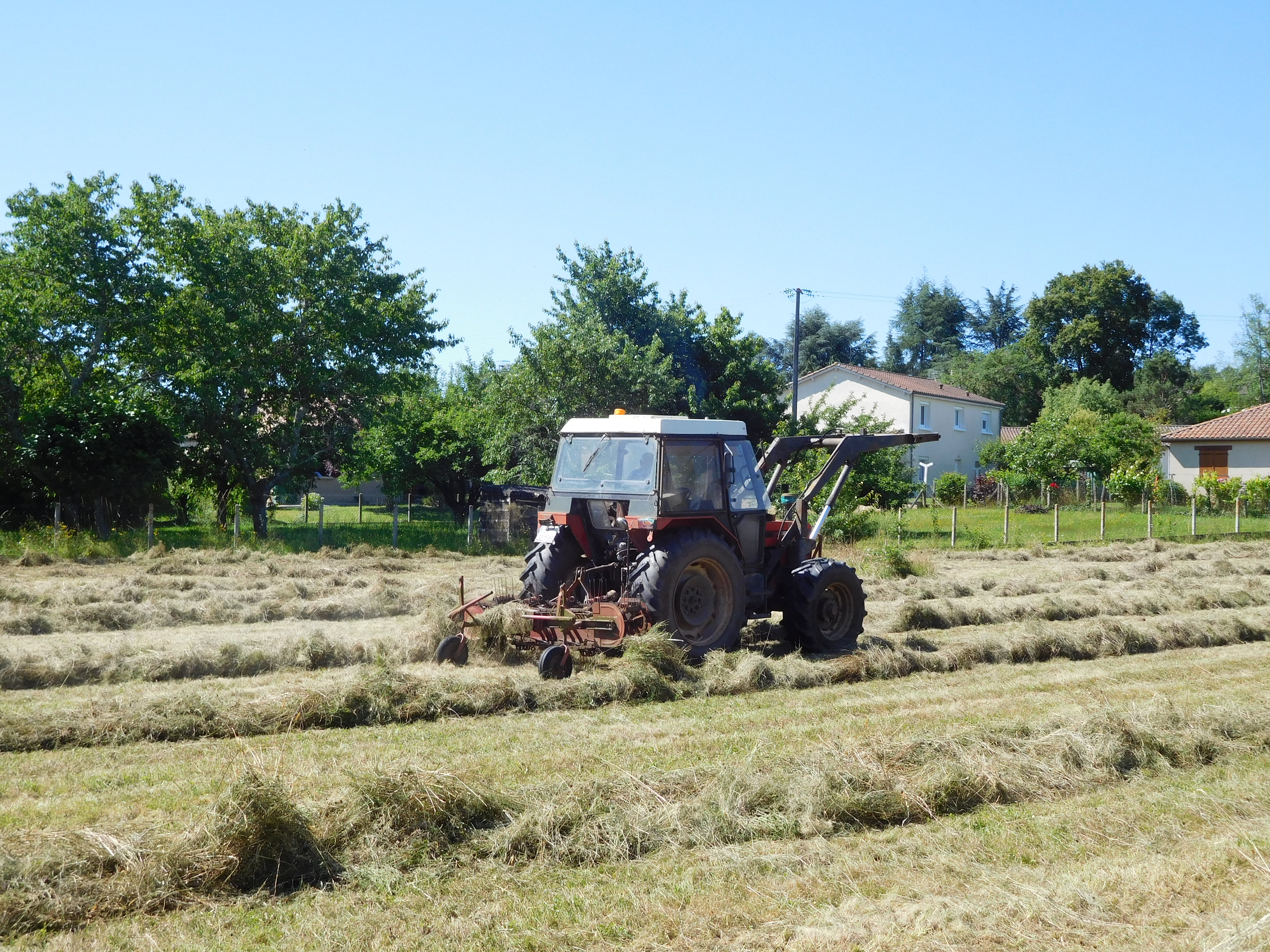 Andaineur tiré par un tracteur Zetor 7745 ; en Dordogne, France.